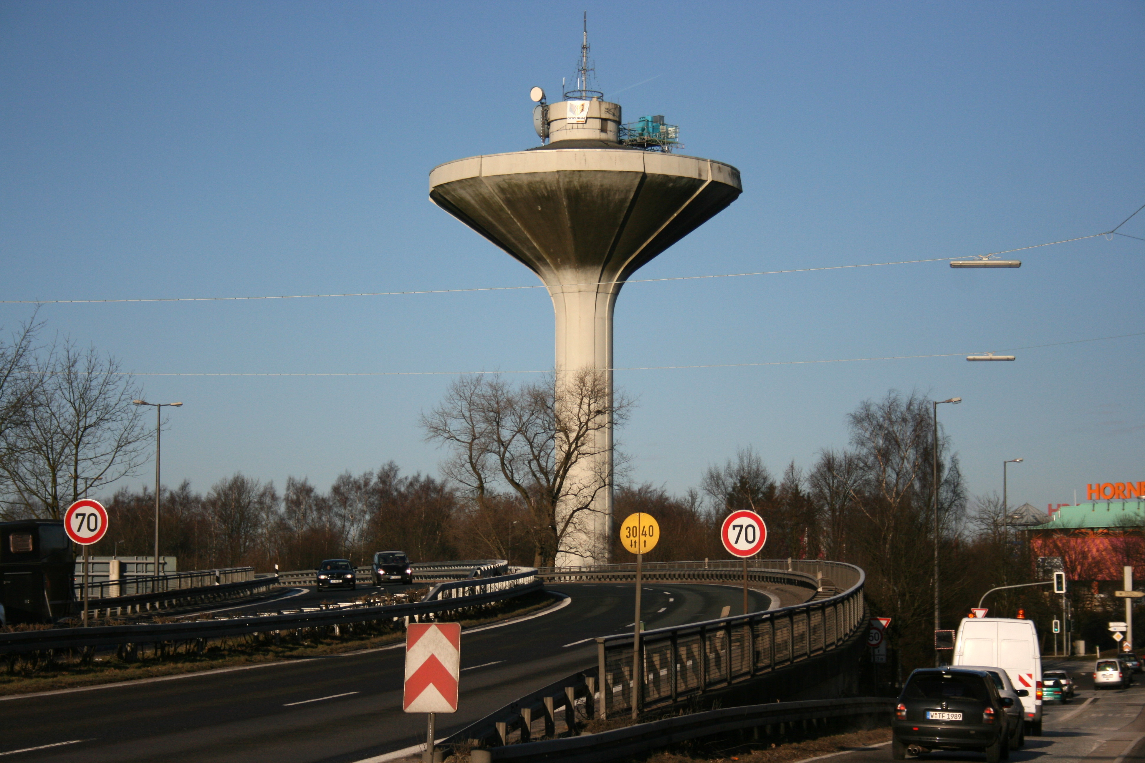 Lichtscheider Wasserturm in Wuppertal, Lichtscheider Straße